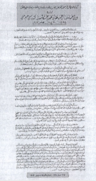 Titah Perisytiharan Penubuhan MAIK